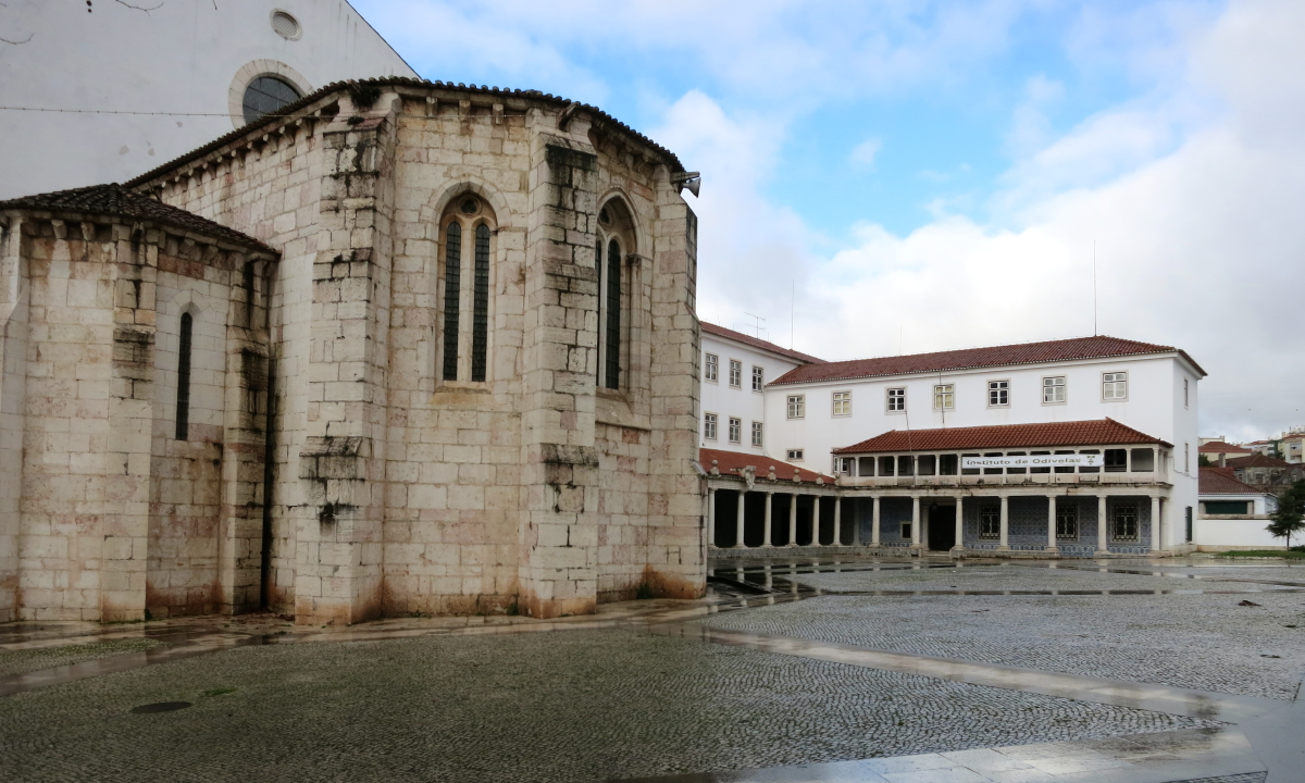 Mosteiro S. Dinis, Odivelas